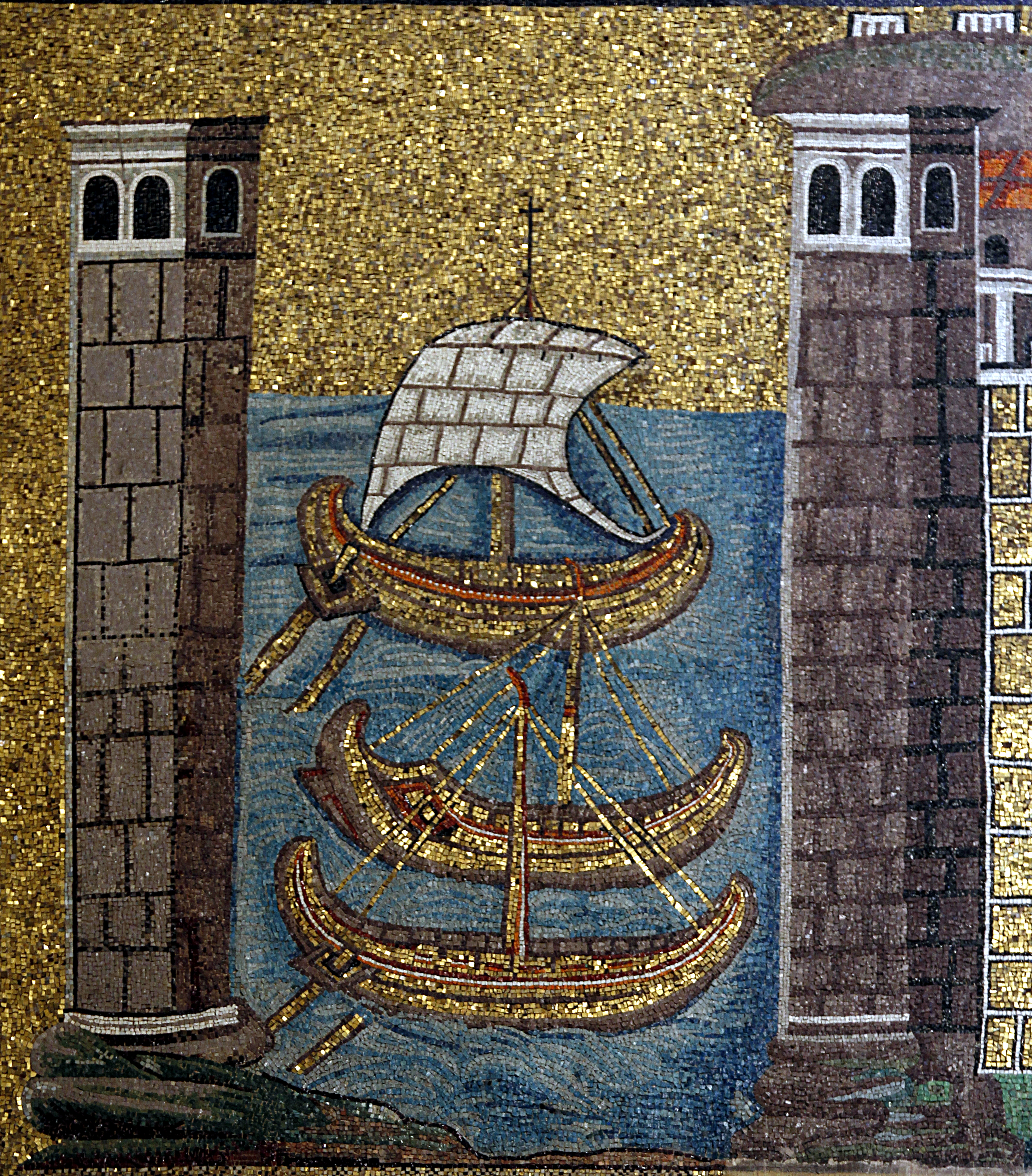 Sant'Apollinare Nuovo - Ravenna